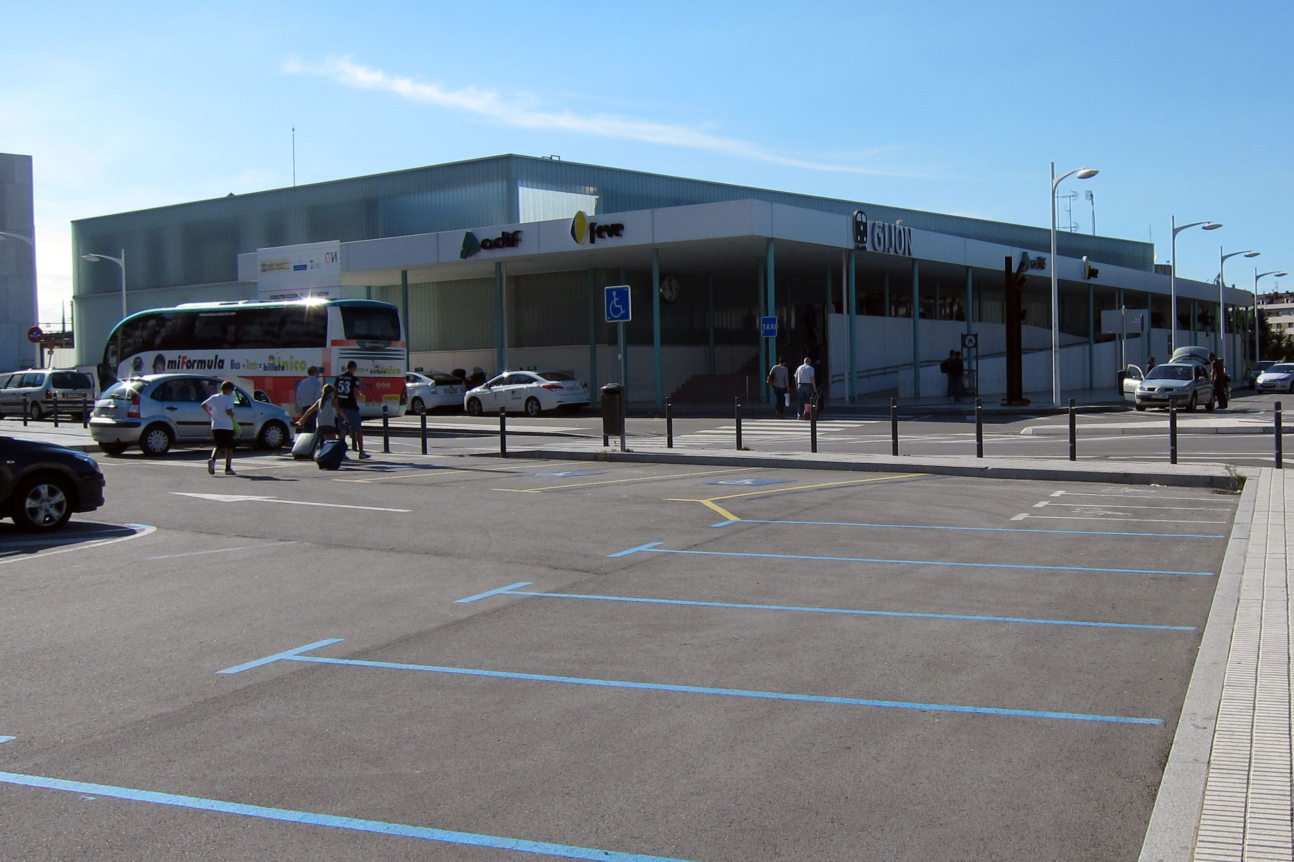 Estación de Gijón-Sanz Crespo